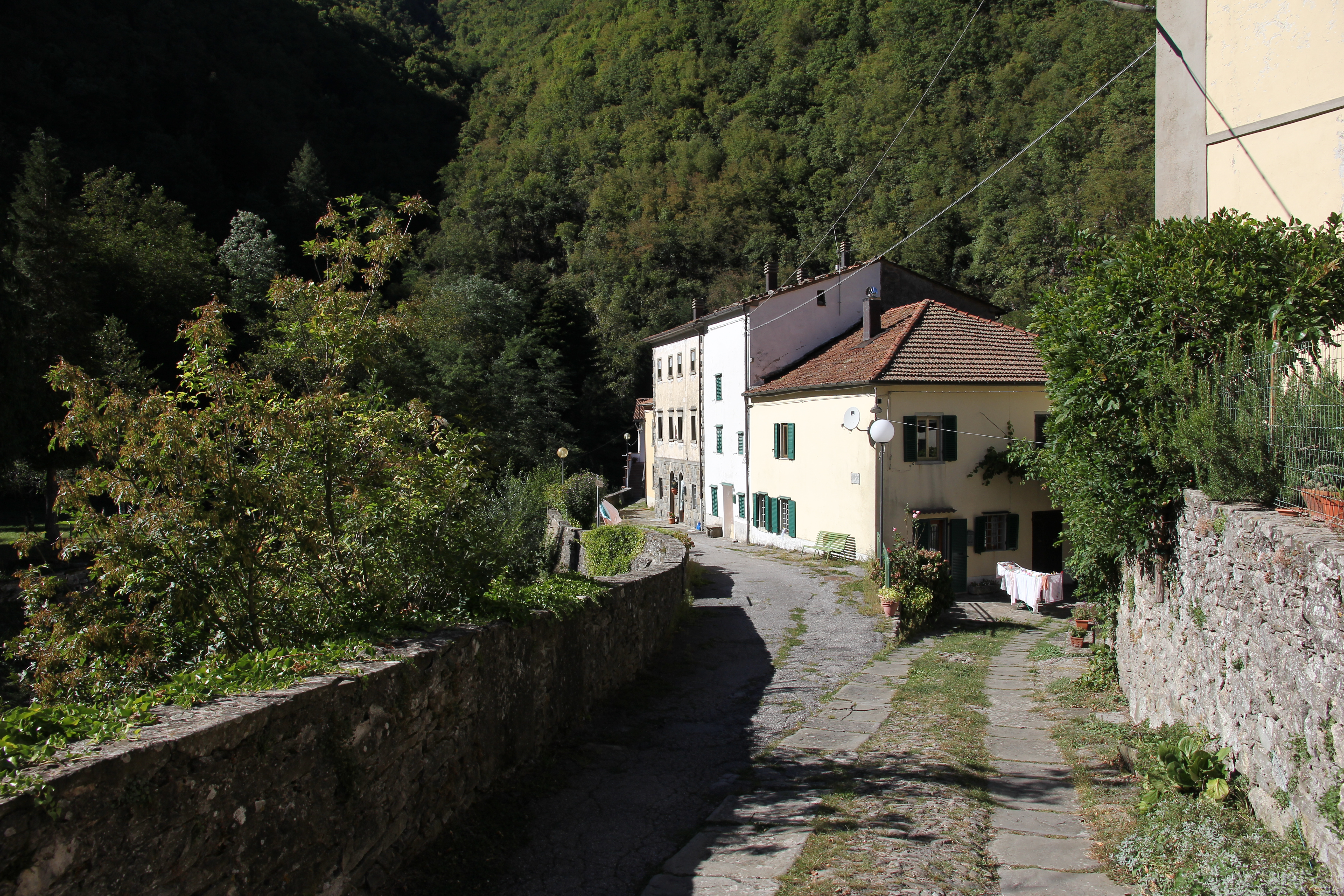 frazione Taviano in comune di Sambuca Pistoiese